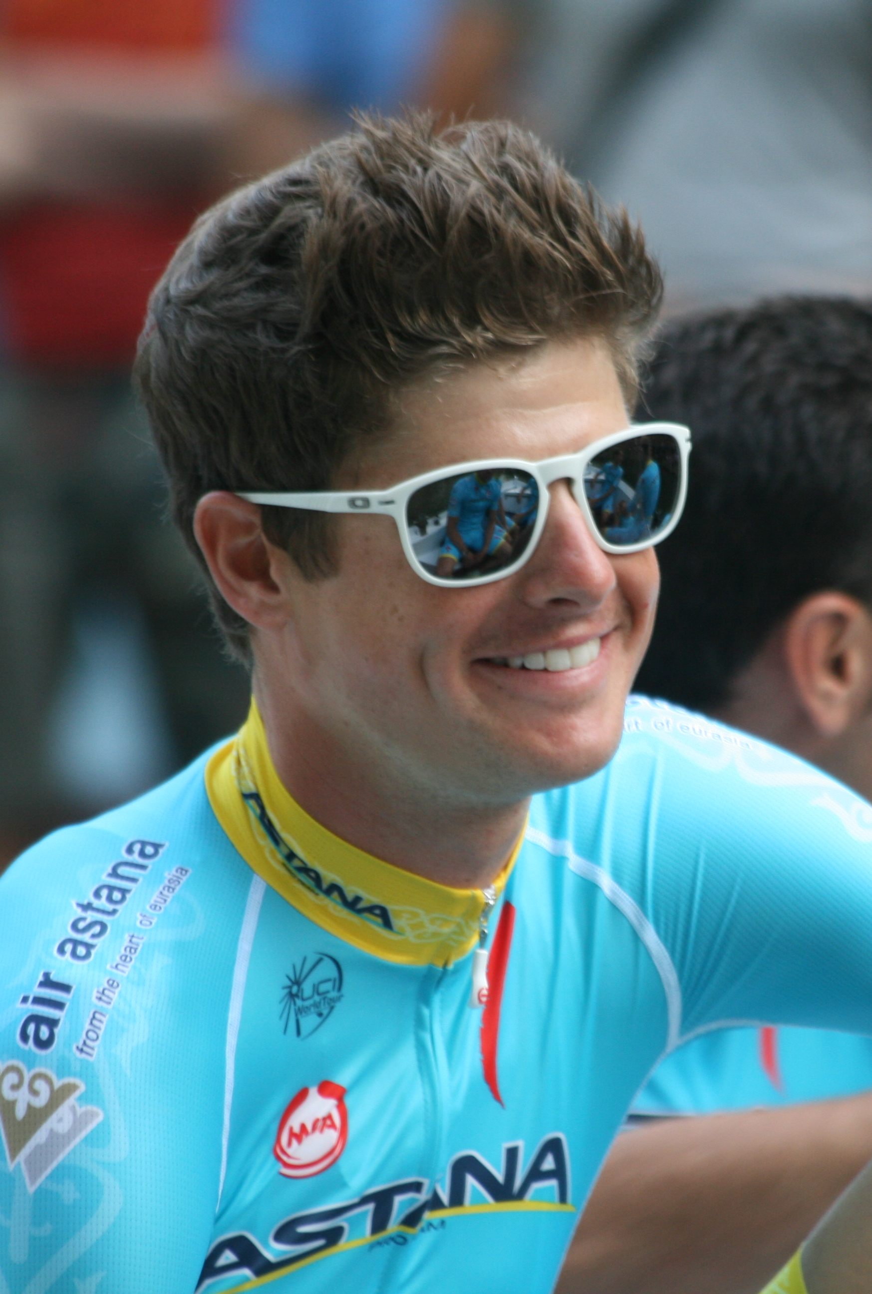 ploegenpresentatie Tour de France 2015 Utrecht